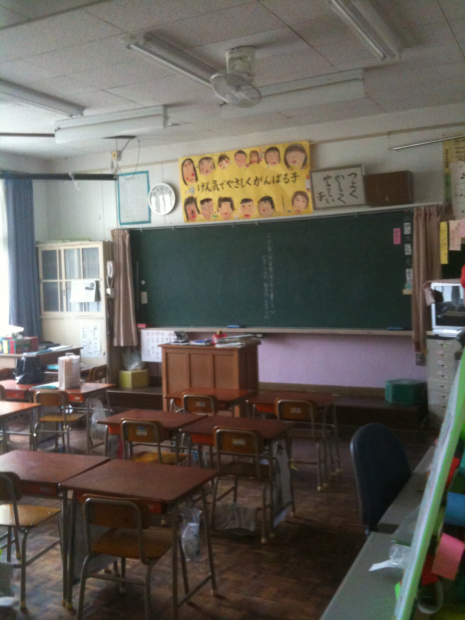 2010年2月の教室